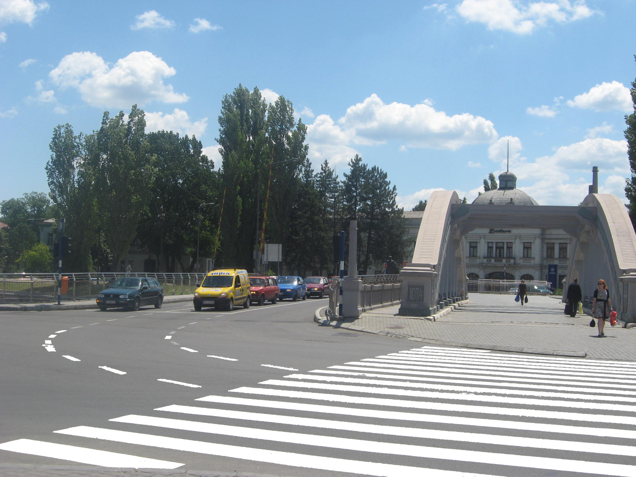 ЈКП НИСКОГРАДЊА КРАГУЈЕВАЦ